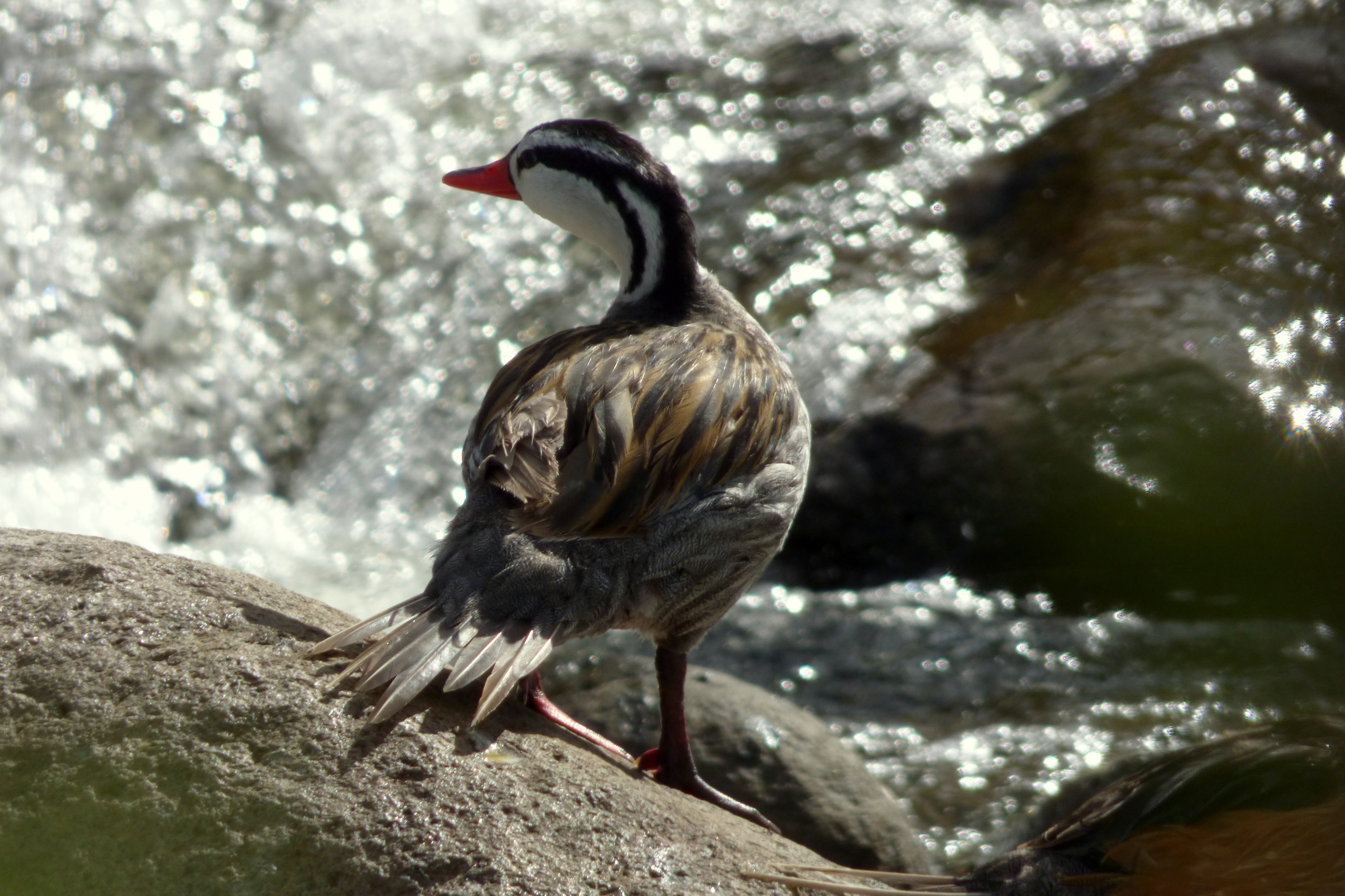 Merganetta armata (Pato de torrentes) (4)